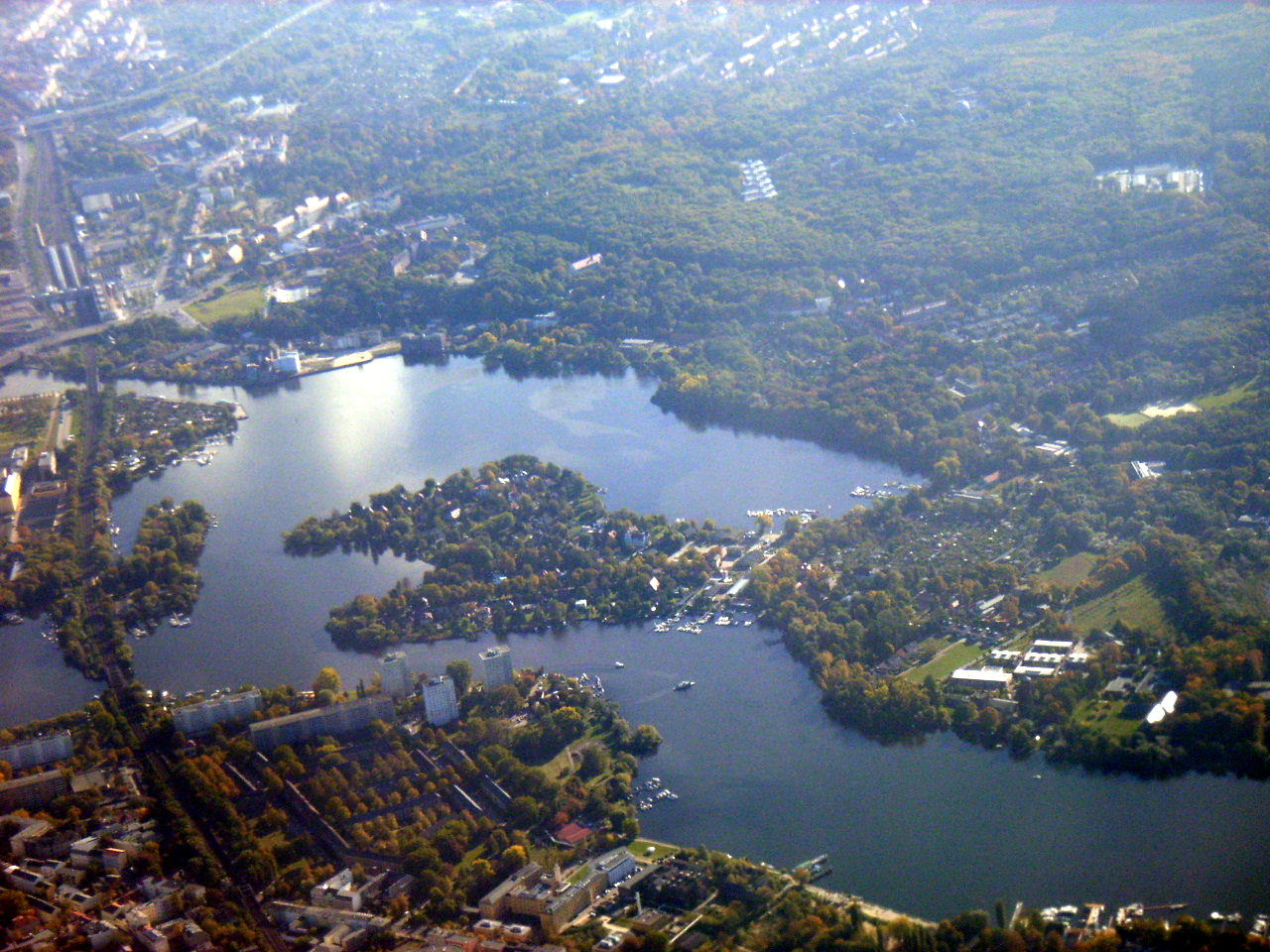 "Vorderkappe" des Templiner Sees und Nordspitze der Halbinsel Hermannswerder von Westen gesehen; links oben der Potsdamer Hauptbahnhof.